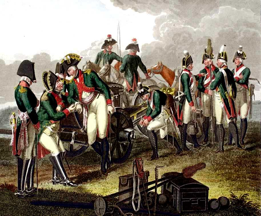 Artilleriekorps. Im den Jahren 1805 und 1806 fertigte Carl Adolph Heinrich Hess eine sowohl künstlerisch ansprechende als auch uniformkundlich interessante Serie von 16 Tafeln über die damalige sächsische Armee. Der Titel der Serie lautet Abbildung der Chur-Sächsischen Truppen in ihren Uniformen unter der Regierung Friedrich August III. Die Tafeln bestechen durch ihren Detaillierungsgrad und bieten eine wertvolle Unterstützung bei der Beurteilung des äußeren Erscheinungsbildes der sächsischen Armee während des Feldzuges von 1806.